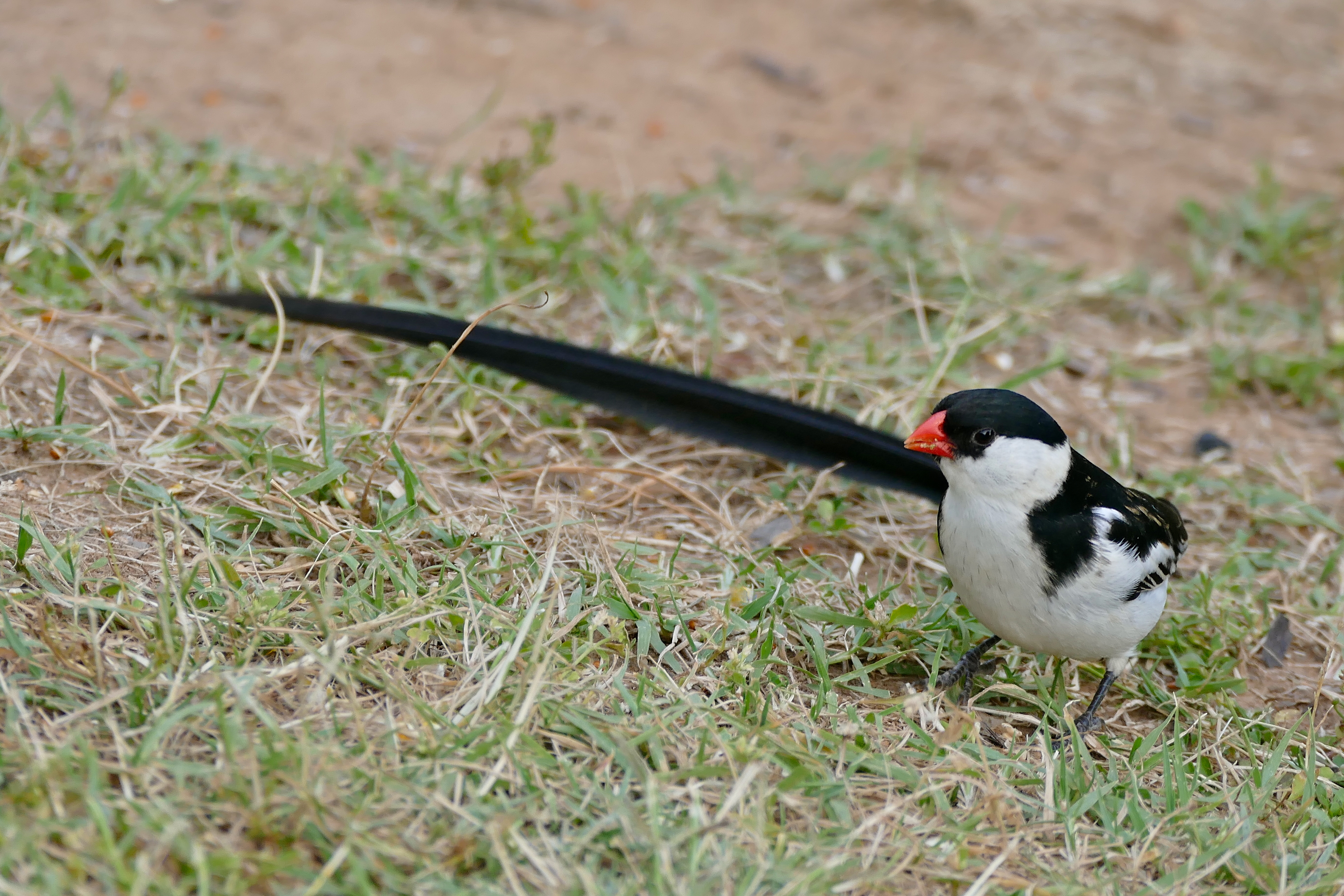 Lang Elsie's Kraal Campsite, Bontebok NP, Western Cape, SOUTH AFRICA